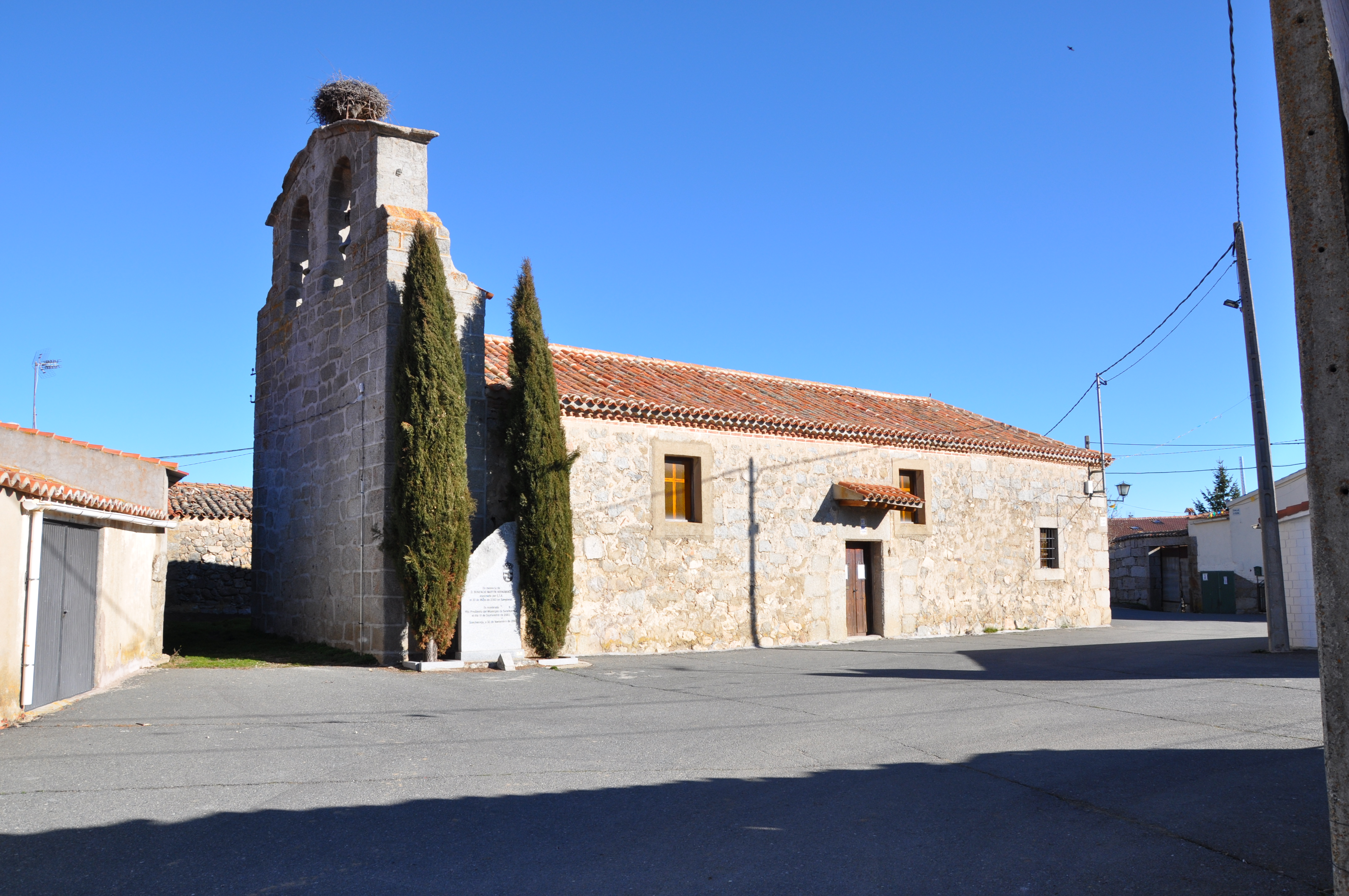 Iglesia de San Martín, Sanchorreja, Ávila, España